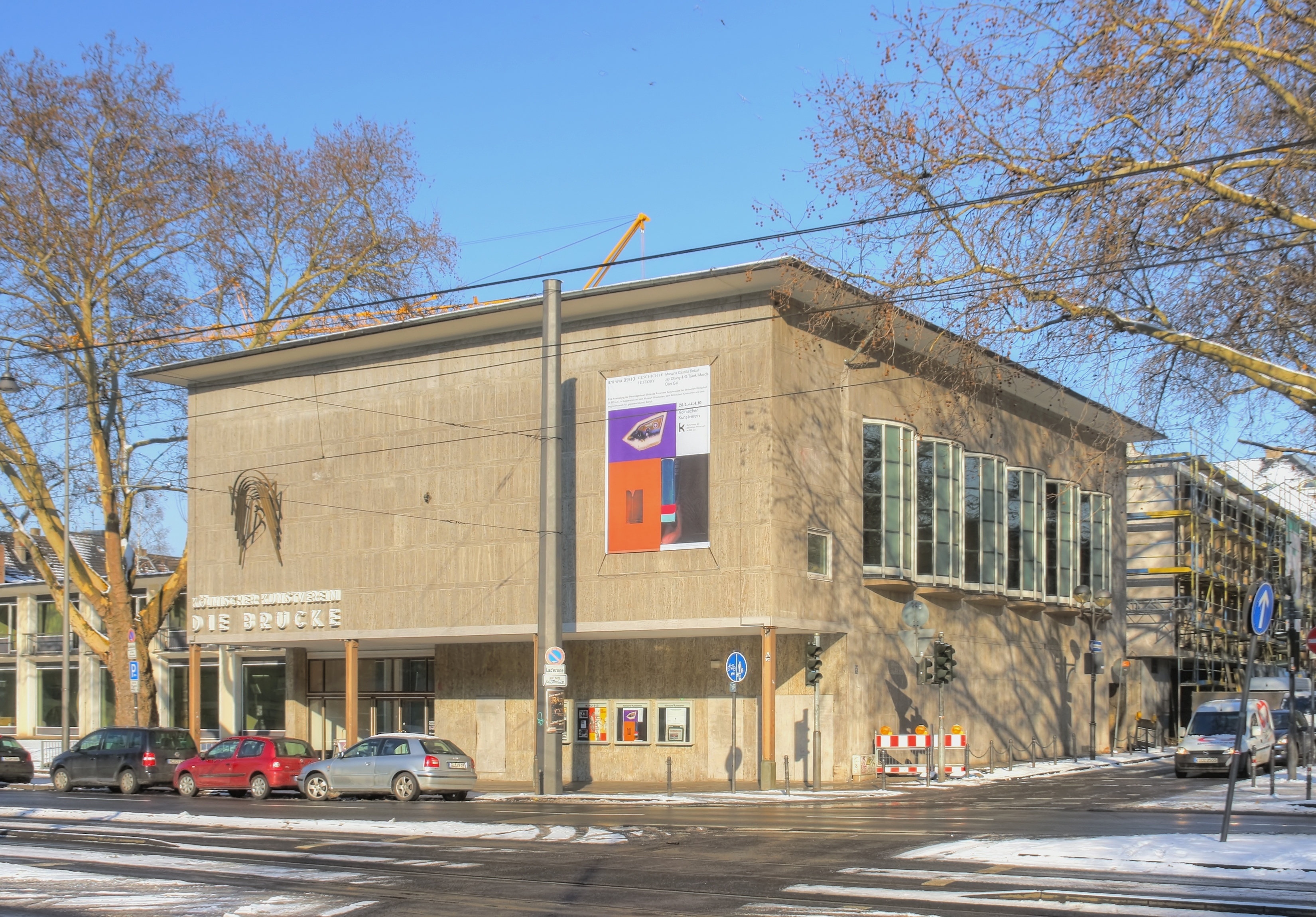 „Die Brücke“ - Sitz des Kölnischen Kunstvereins. Ehemals British Council. Hahnenstraße 6. Architekt: Wilhelm Riphahn This is a photograph of an architectural monument.